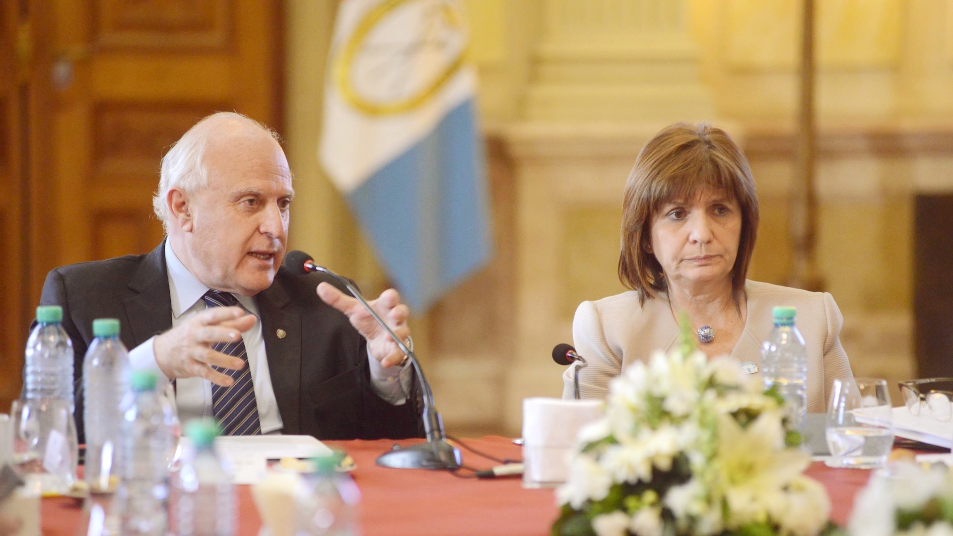 Patricia Bullrich, Ministra de Seguridad de la Nación, junto al gobernador de la provincia de Santa Fe, Miguel Lifschitz.